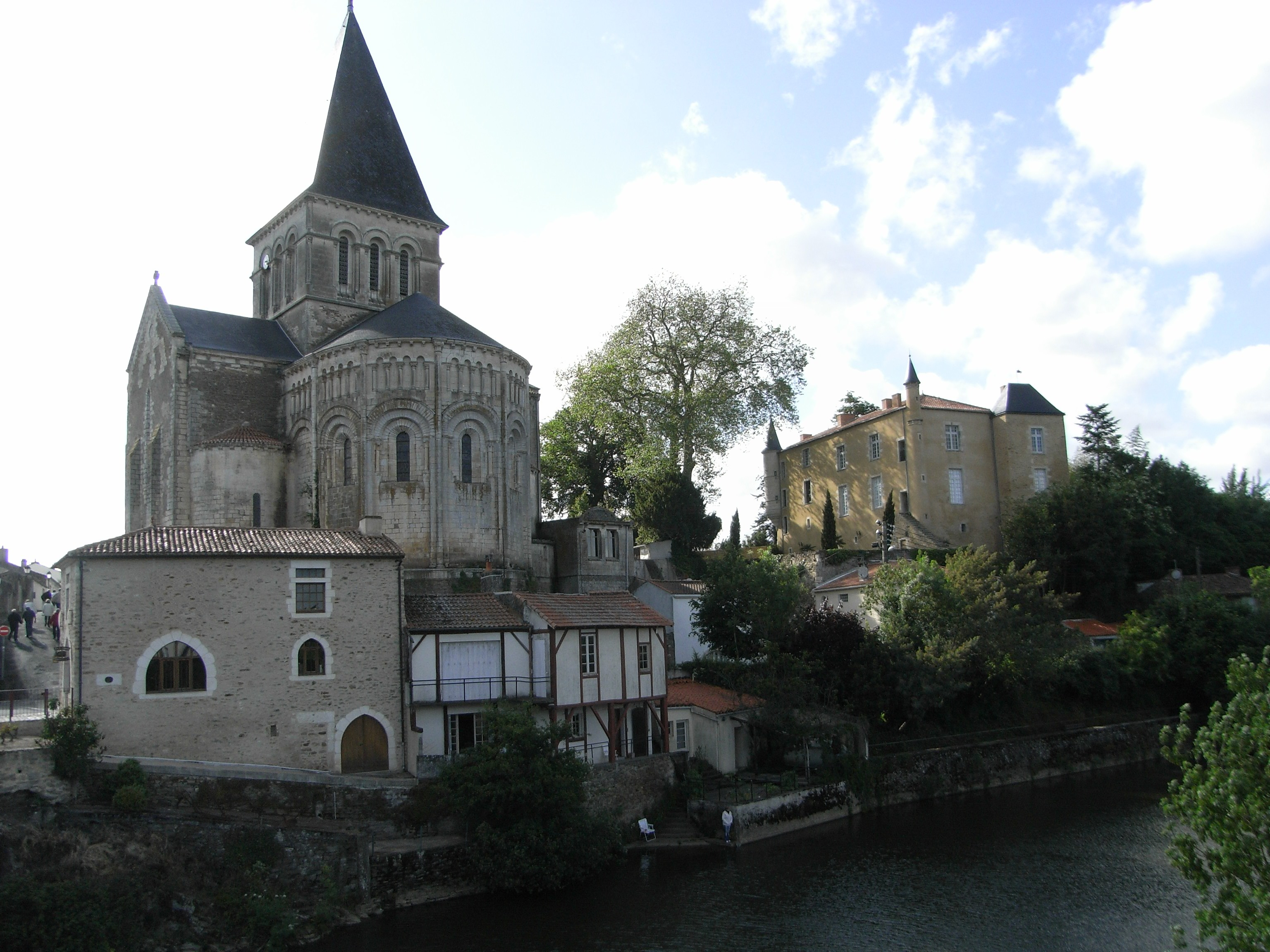 Vue de l'église et du Lay (fleuve) à Mareuil-sur-Lay-Dissais (Vendée en France)